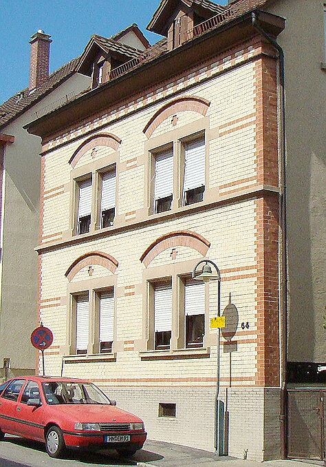 Ausschnitt aus File:Hn-boeck-eppinger64.jpg